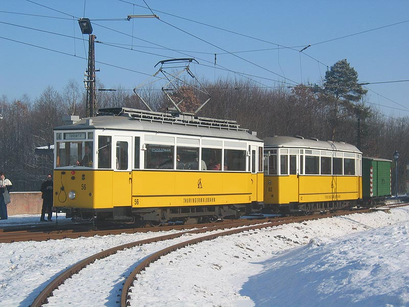 Traditionszug der Thüringerwaldbahn